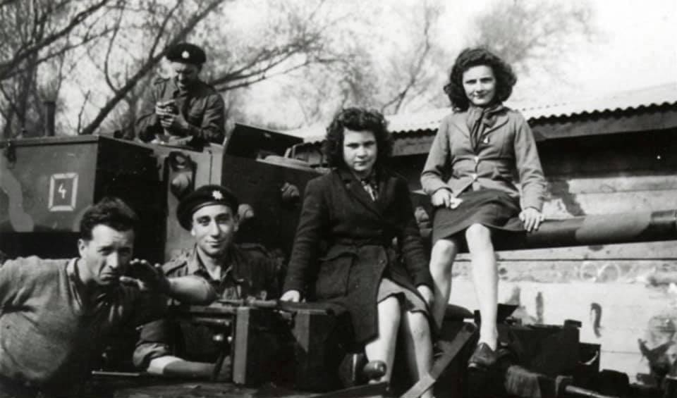 Jan Horal